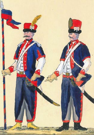 Towarzysz i pocztowy Pułku Straży Przedniej Arnolda Byszewskiego (późniejszy 4 pułk straży przedniej